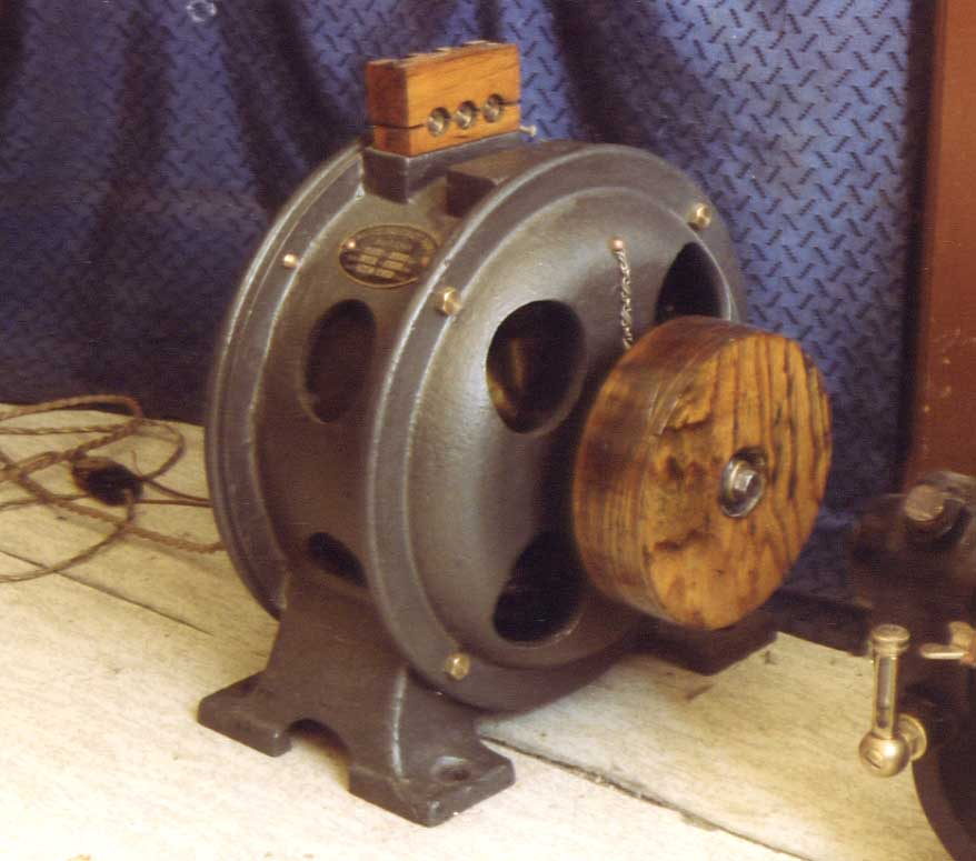 Moteur alternatif à cage, Alioth de Lyon, numéro 19021 type JMDO, vers 1907.